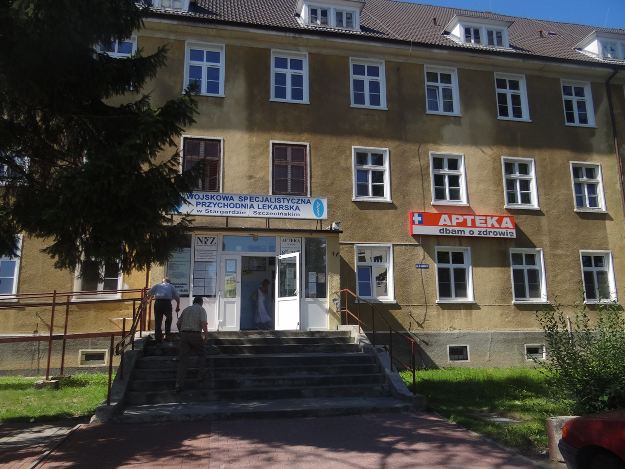 Stargard Szczeciński - Wojskowa Specjalistyczna Przychodnia Lekarska, apteka